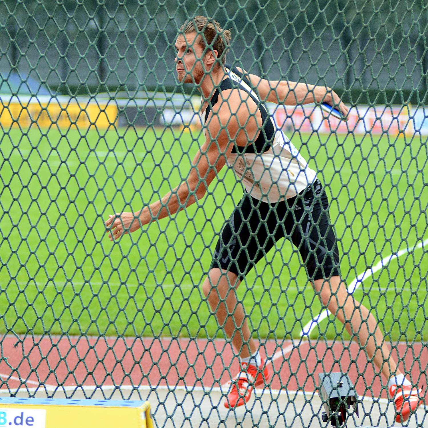 Mehrkampf-Meeting Ratingen 2014 – Rico Freimuth Diskuswerfen